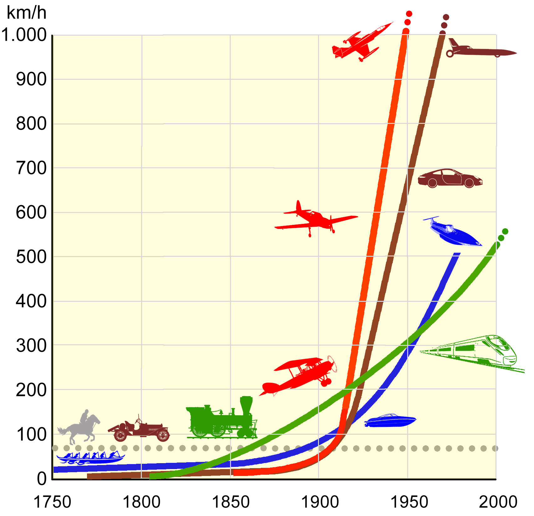 Idealisierte Verläufe für die Geschwindigkeitsrekorde zu Land, zu Wasser und in der Luft nach den Daten aus